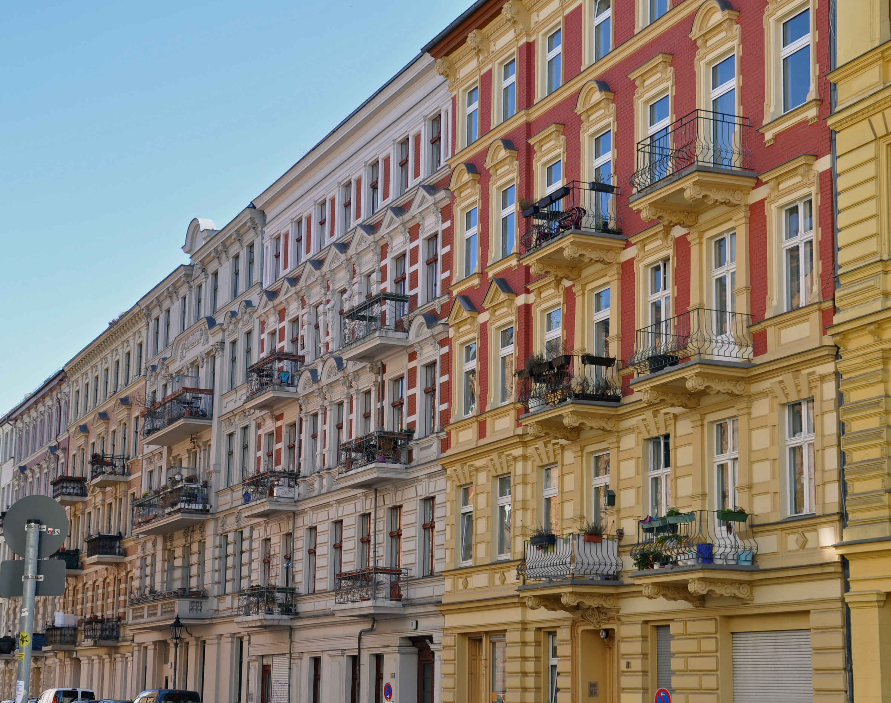 fassade, friesenstr./ecke arndtstr., Berlin-Kreuzberg